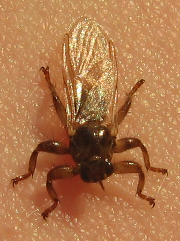 Lipoptena cervi, Finland